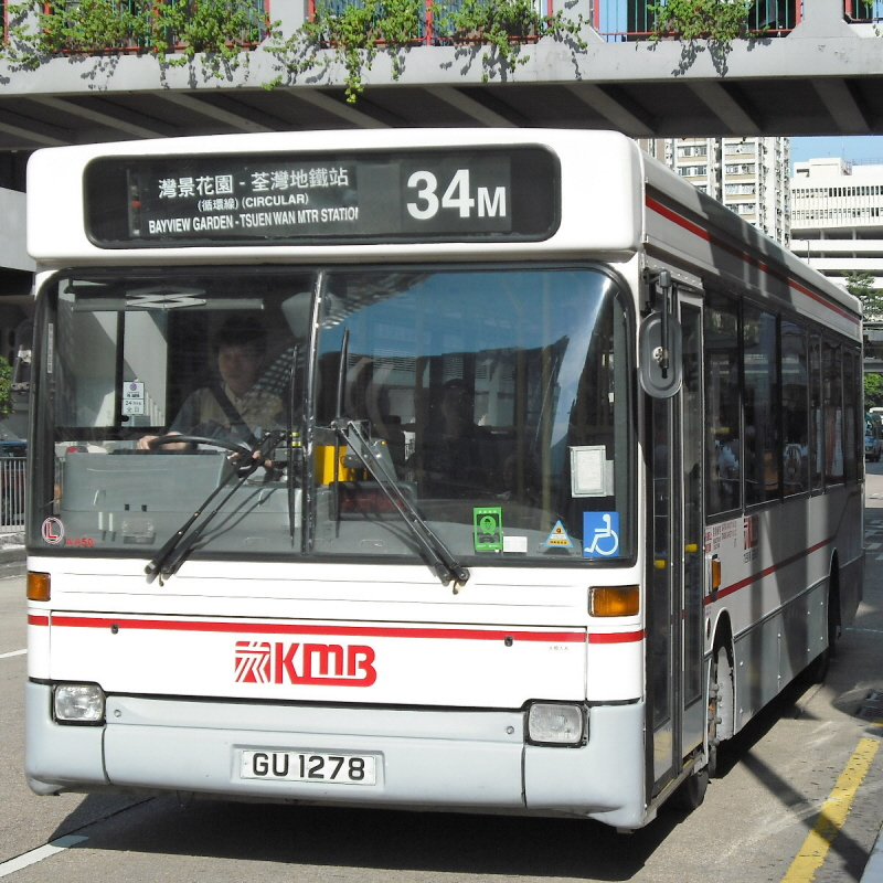 九巴34M線巴士，攝於荃灣地鐵巴士總站對面近富華街巴士站